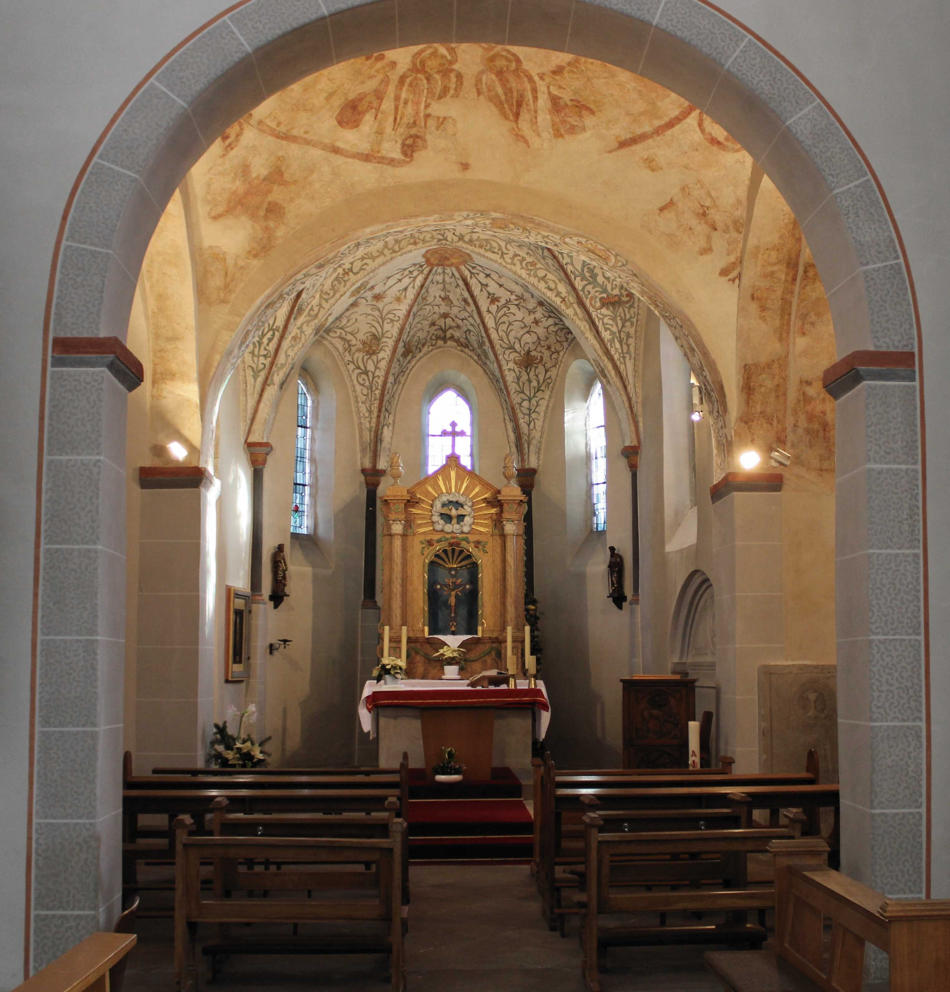 Saint Margareta Neunkirchen-view in the choir